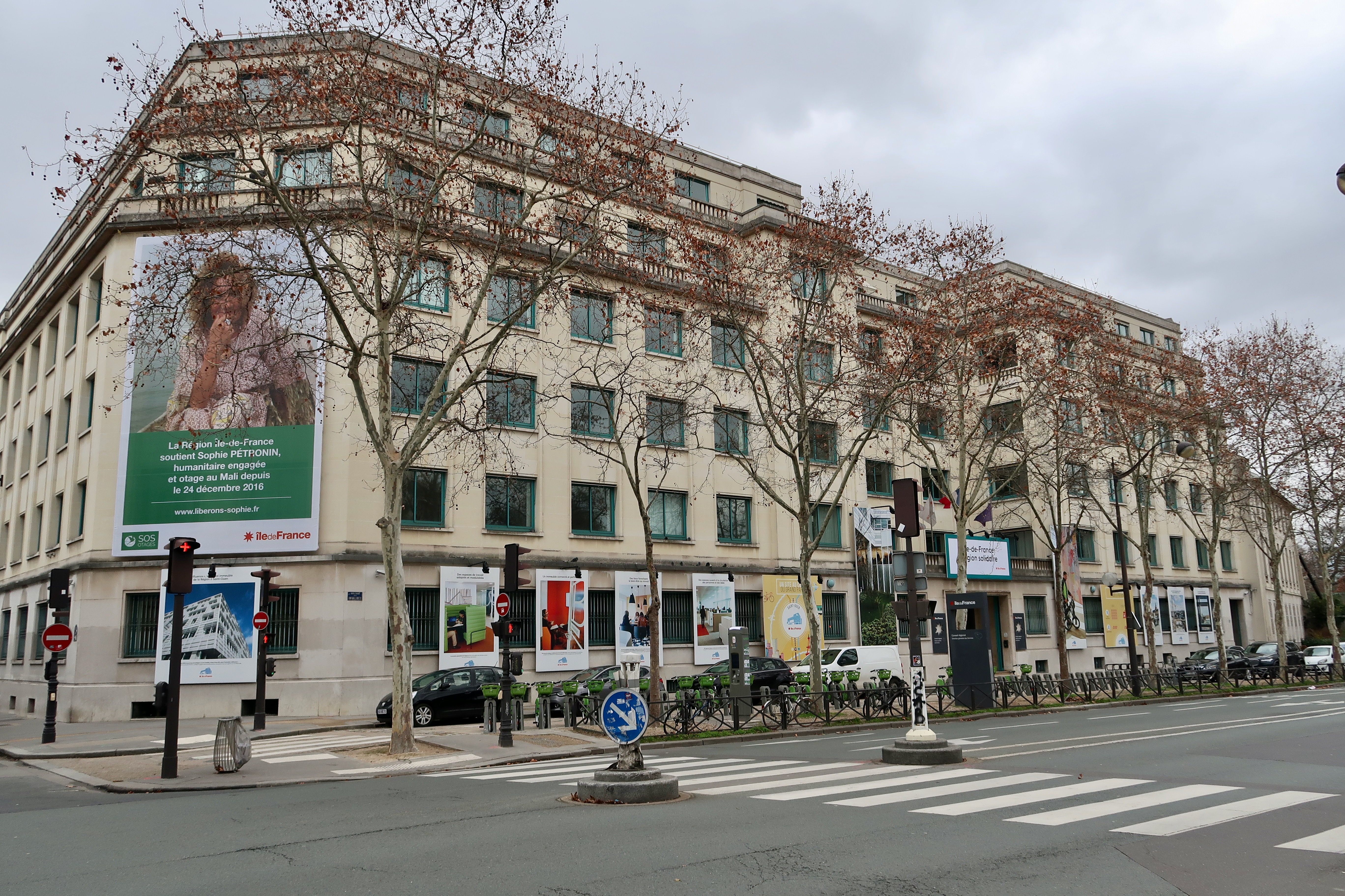 Direction des services du conseil régional d'Île-de-France, 35 boulevard des Invalides (Paris, 7e).